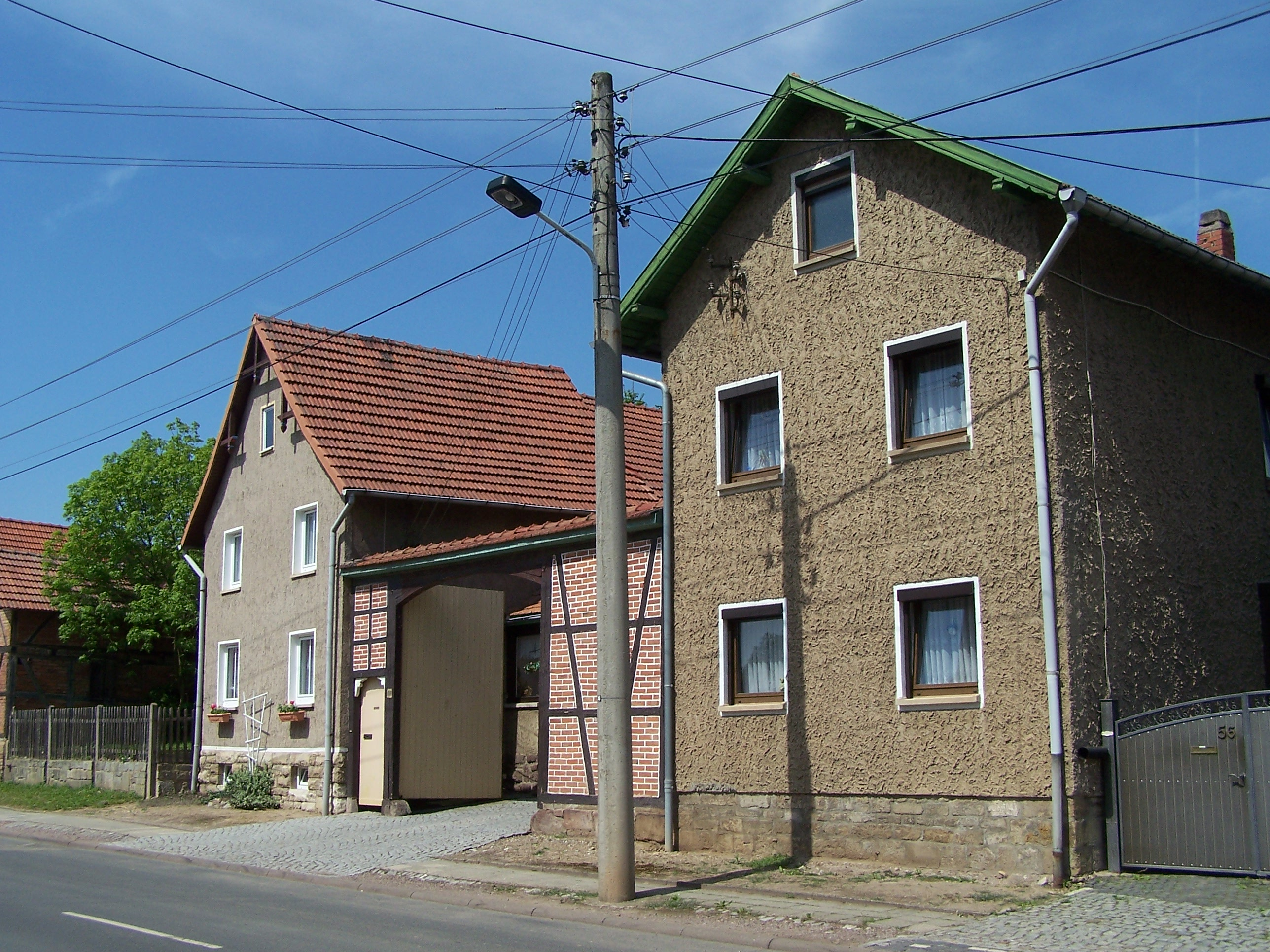 Ansicht von Hötzelroda, einem Stadtteil von Eisenach.